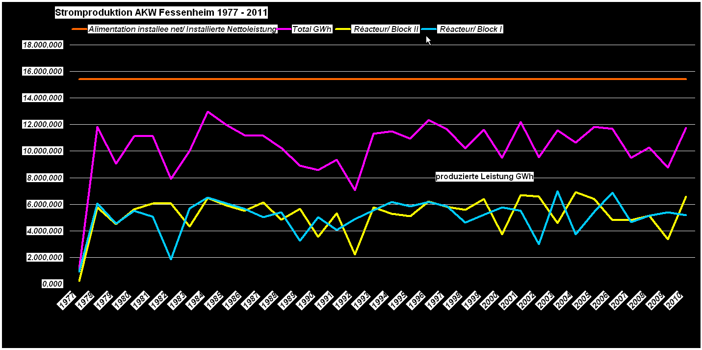 Liniendiagramm zur Stromproduktion des AKW Fessenheim in den Jahren 1977 bis 2010; deutsch/ französisch